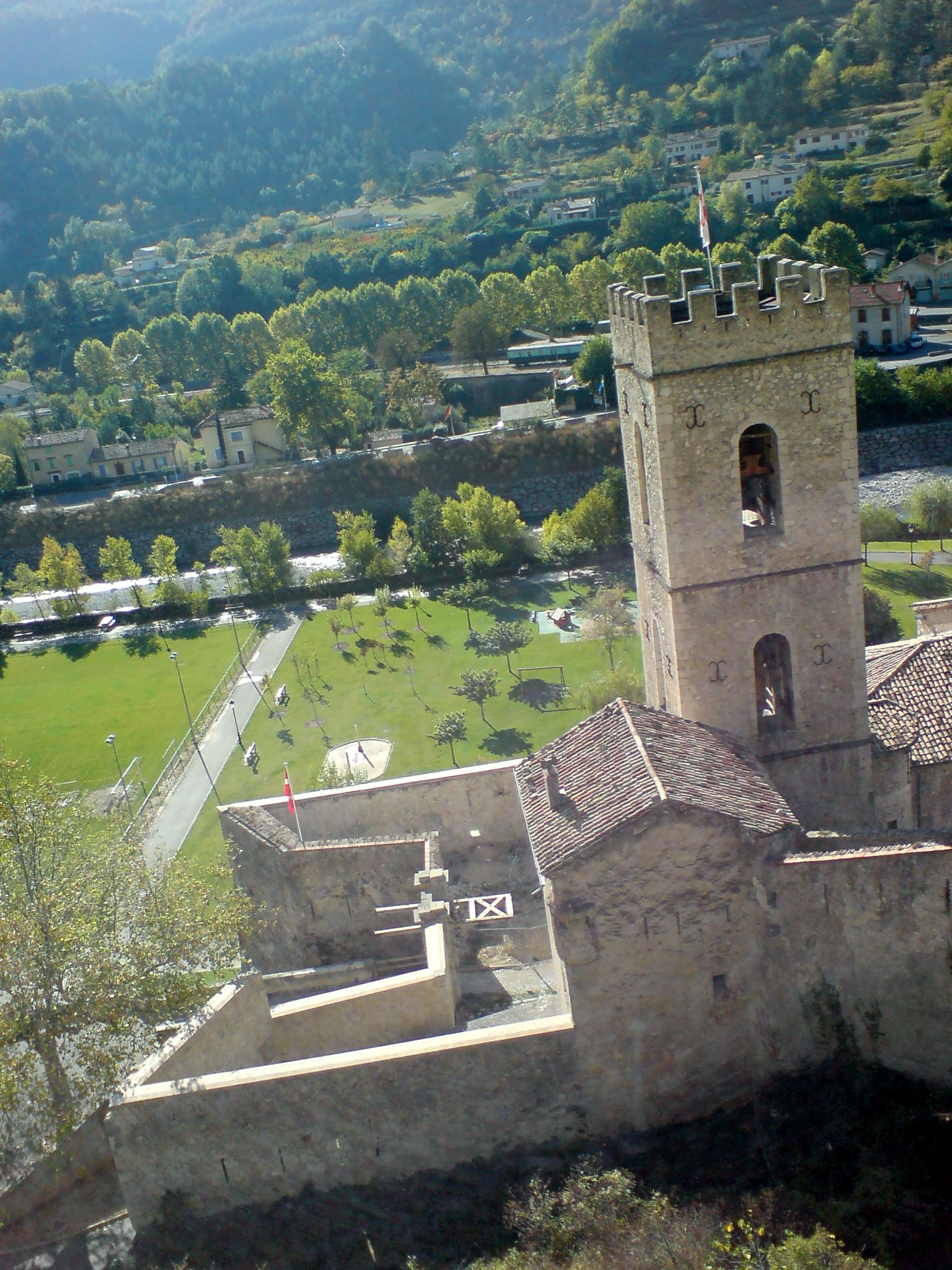 Description Porte d’Italie de la ville d’Entrevaux, vue du chemin d’accès à la citadelle. On voit l’ouvrage à cornes, le pont-levis relevé, la gare en arrière-plan. La tour crénelée est le clocher de l’ancienne cathédrale, qui participait à la défense de la ville. Date7 September 2007SourceOwn workAuthorÉpiméthée Porte d’Italie de la ville d’Entrevaux, vue du chemin d’accès à la citadelle. On voit l’ouvrage à cornes, le pont-levis relevé, la gare en arrière-plan. La tour crénelée est le clocher de l’ancienne cathédrale, qui participait à la défense de la ville.